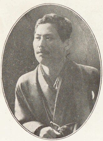 花井卓蔵（1868-1931）